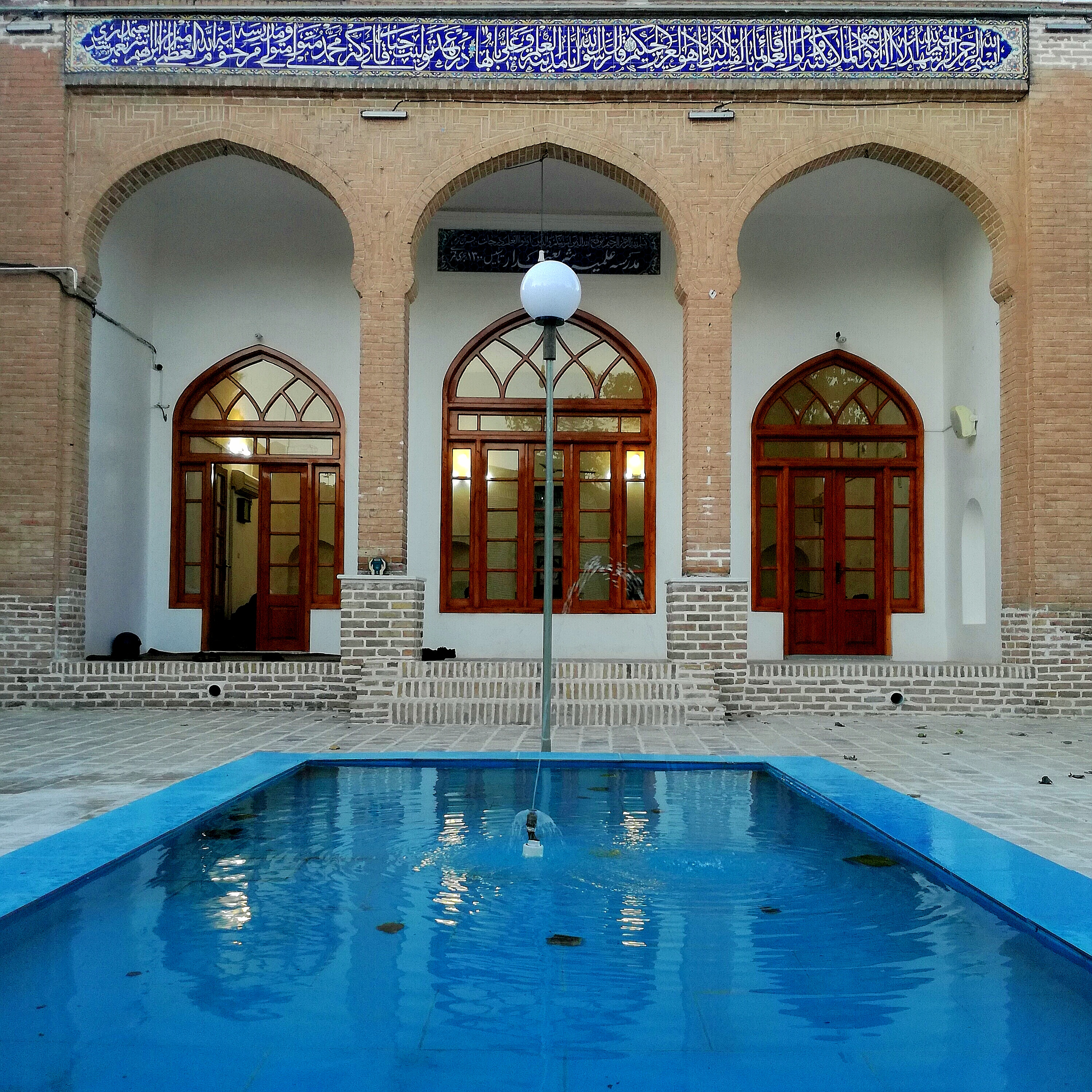 مدرسه علمیه شریعتمدار در سبزوار